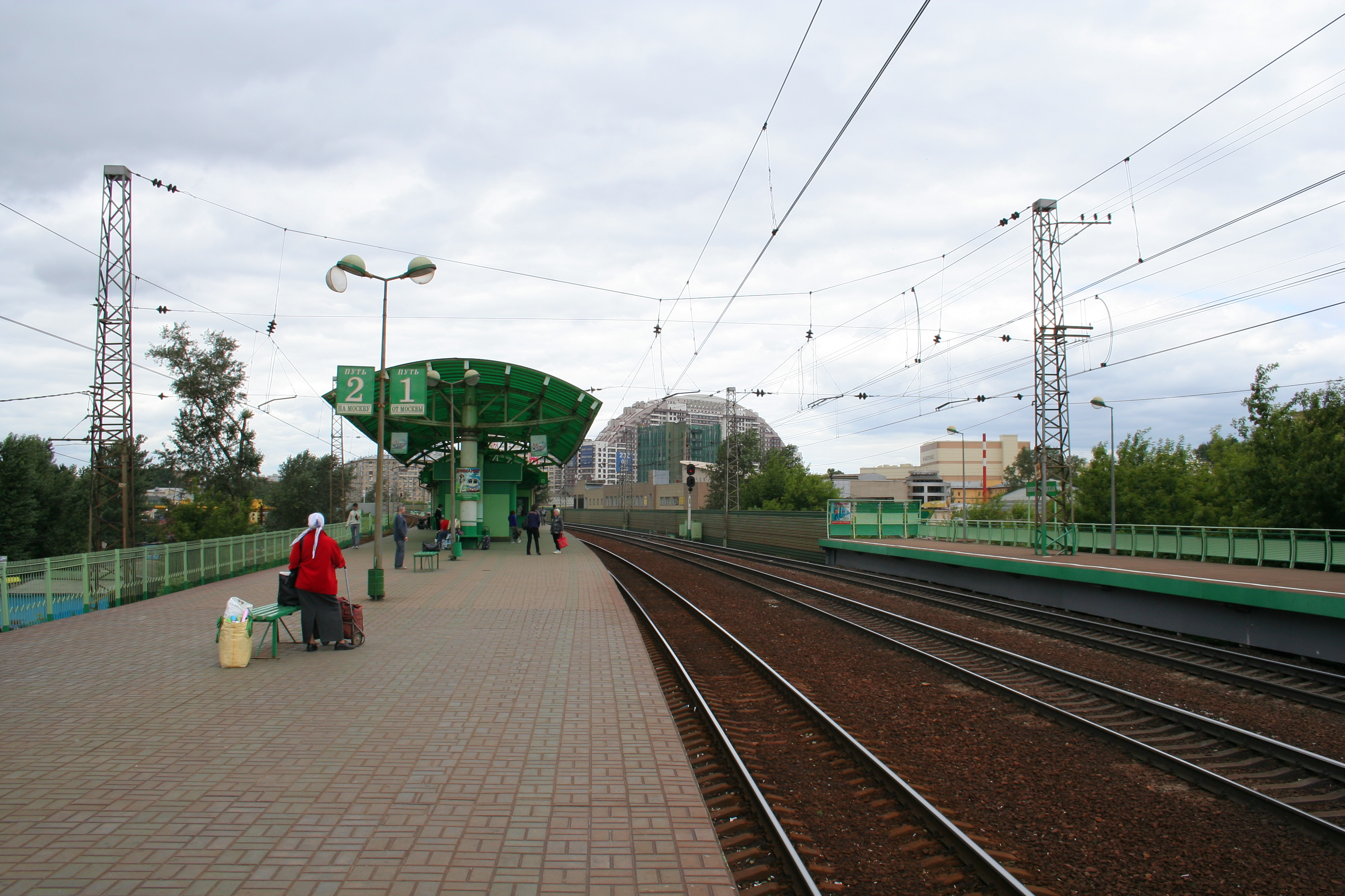 Regional-Bahnhof Elektrosawodskaja in Moskau.